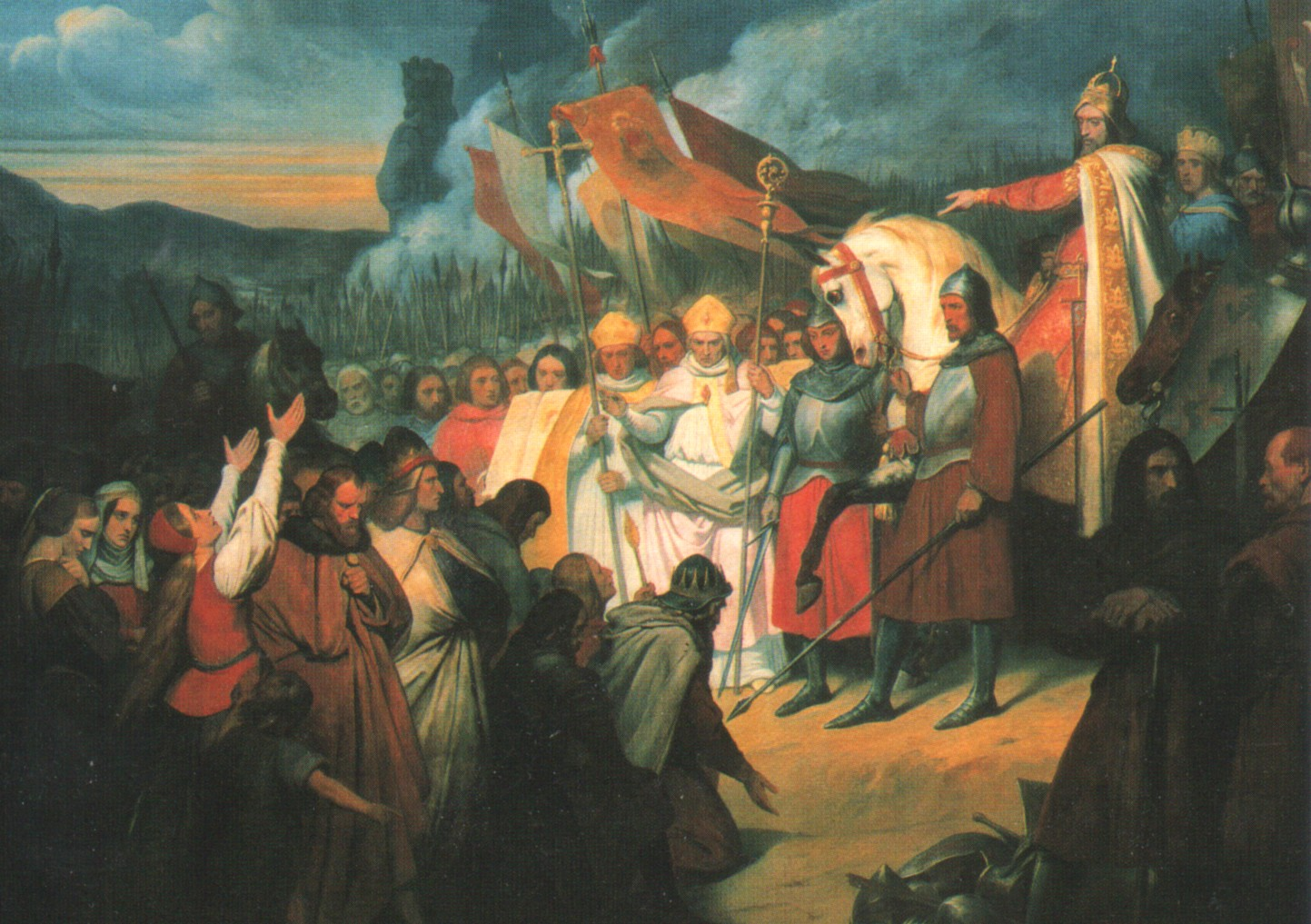 Charlemagne reçoit la soumission de Widukind à Paderborn (1840)